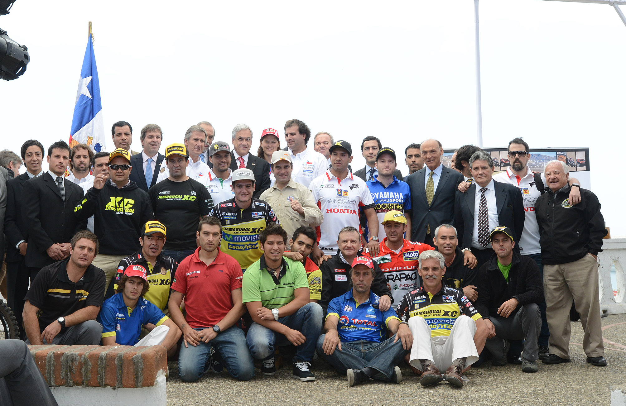 11-12-2013 Lanzamiento del Dakar 2014